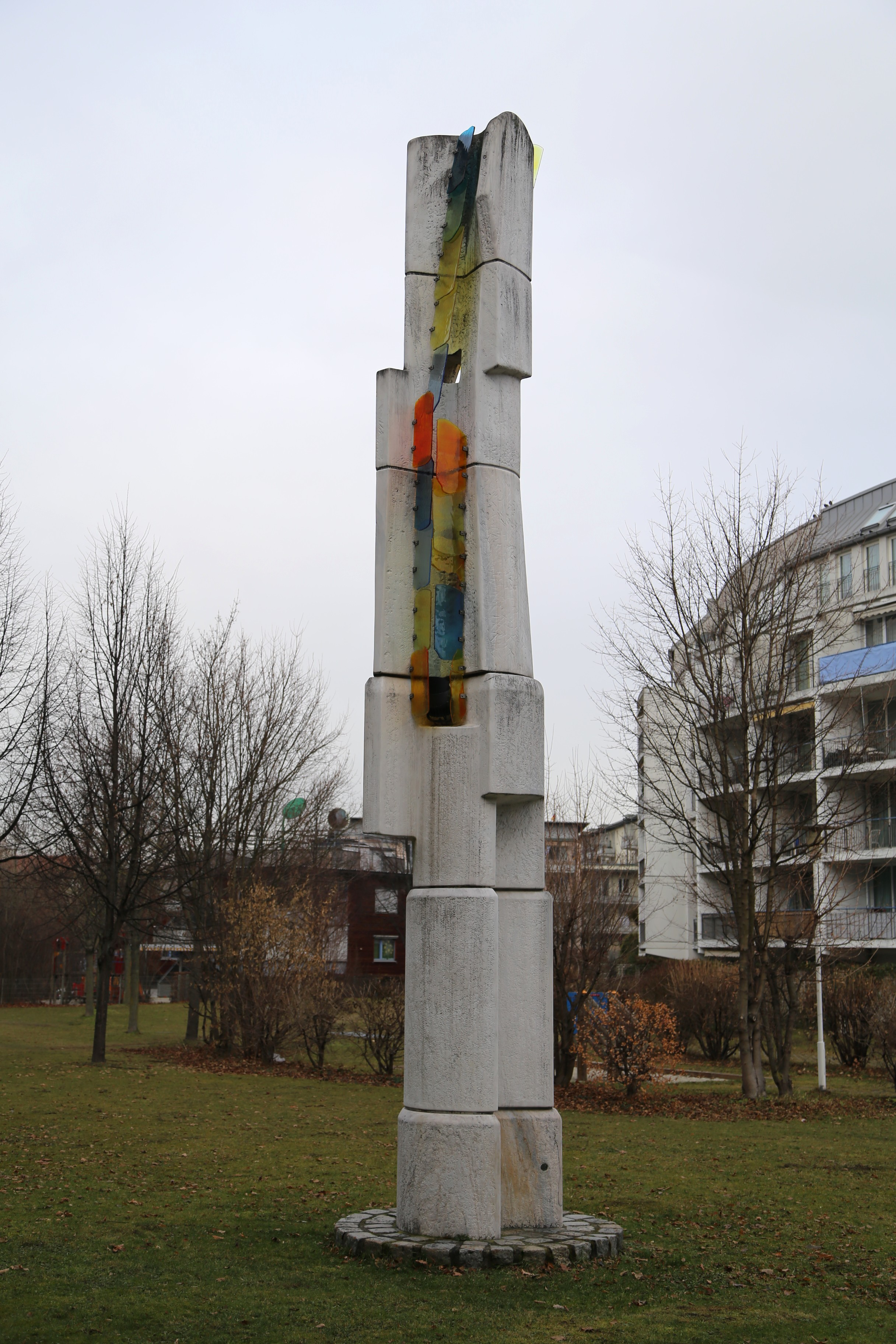 Michael Friederichsen: Lichtzeichen (1996), Marmor, farbiges Glas, 830 cm, Arnulfstraße 126, München